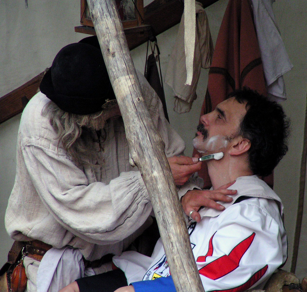 Ein Barbier auf den Mittelaltermarkt beim Kaltenberger Ritterturnier : A historical barber at a mediaeval festival Source: own work Date: July 2005, Kaltenberg, Germany Author: Maschinenjunge Licence: GFDL, cc-by 3.0 de: Barbier